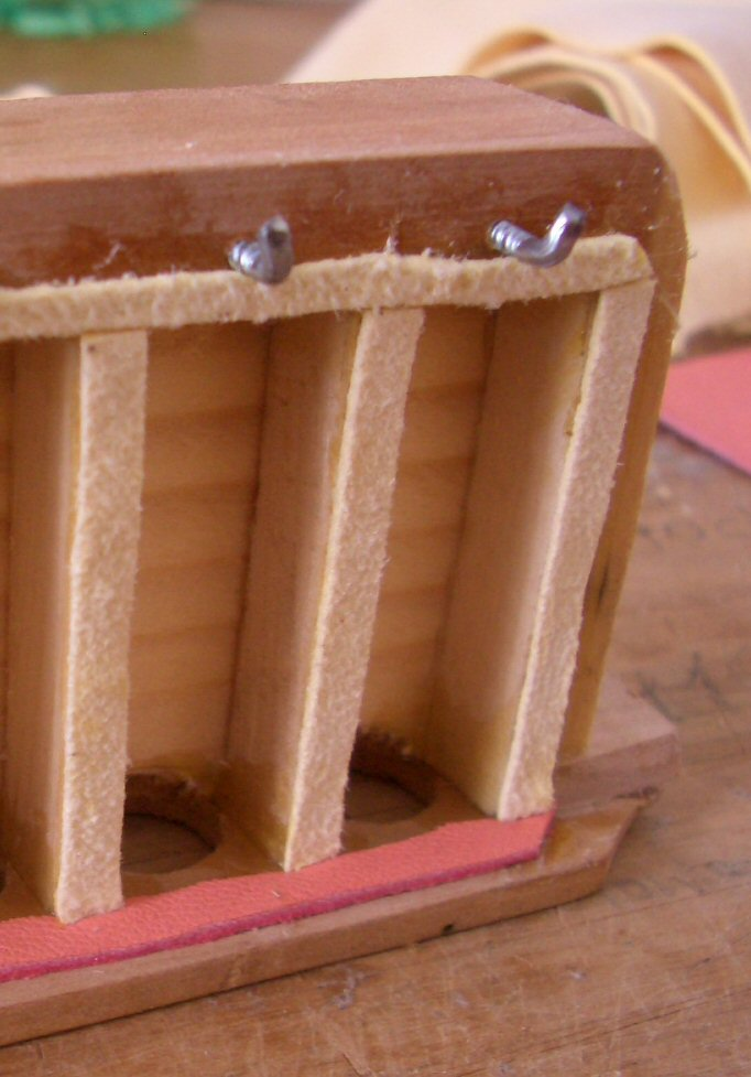 Begleitstimmstockkanzelle mit Lederdichtung und Haken zur Befestigung der Stimmplatte.